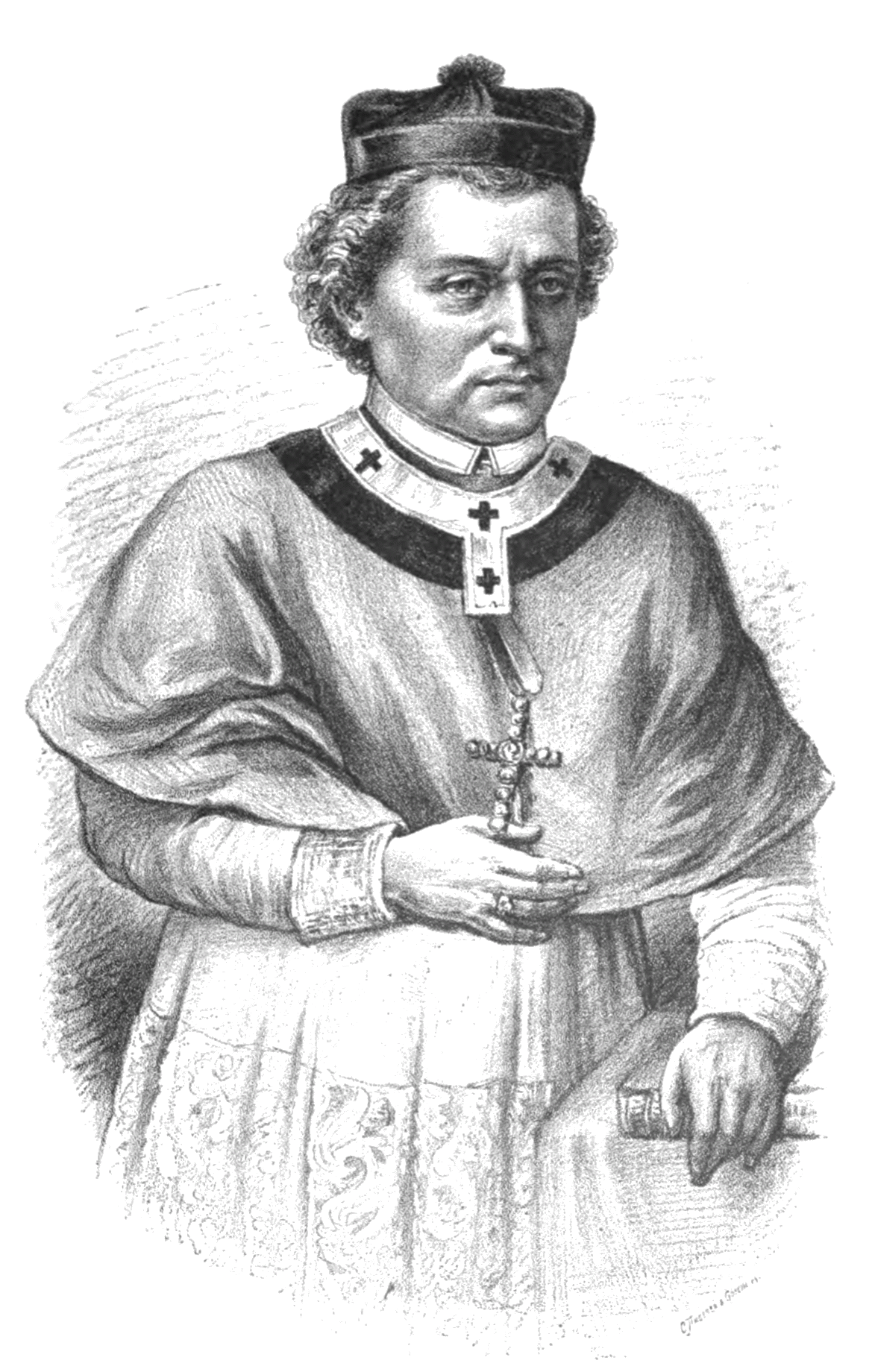 Juraj Drašković (1525-1587), Croatian bishop